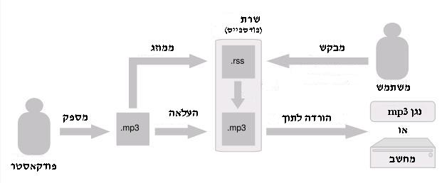 דיאגרמה להמחשת שימוש בפודקאסטים